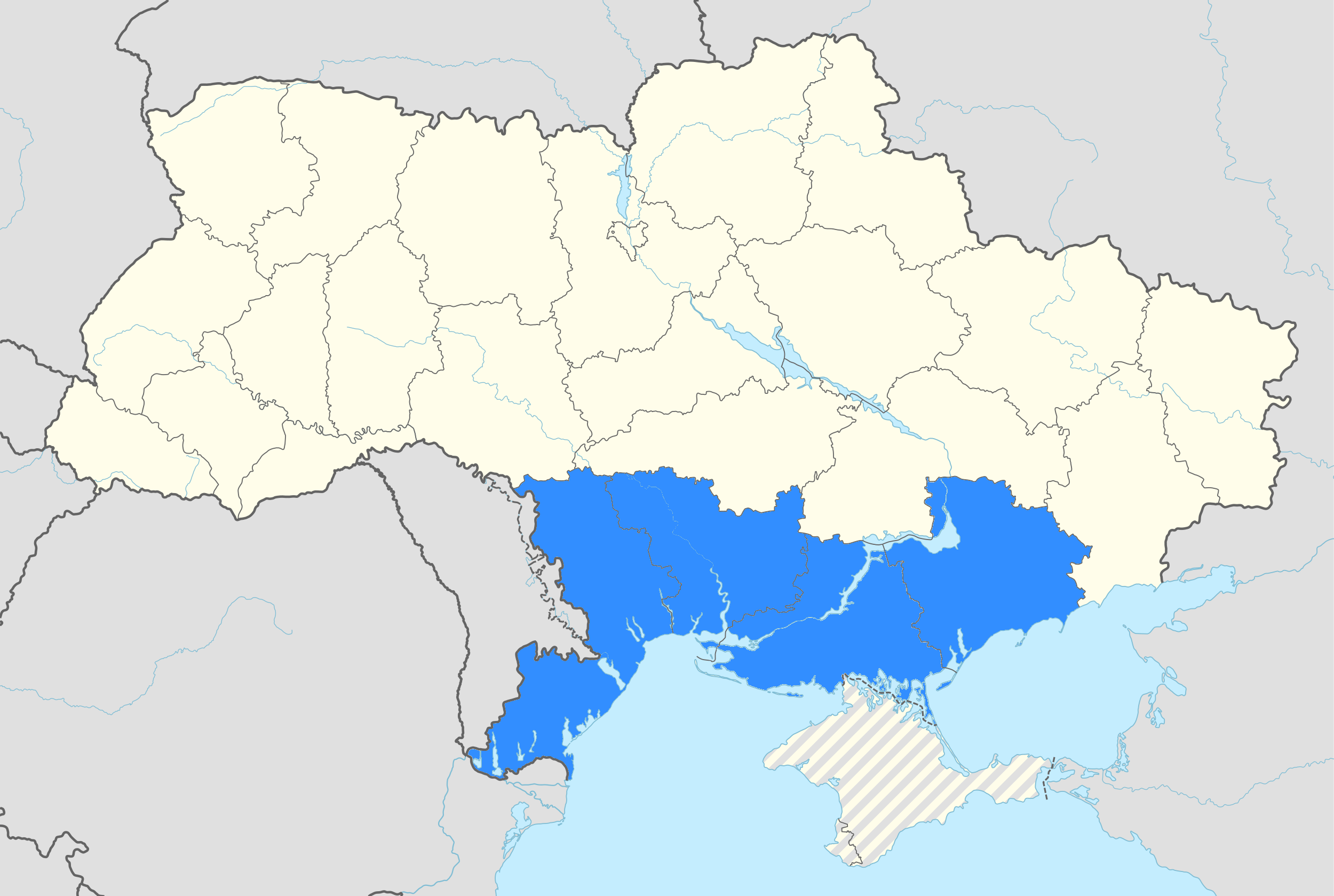 Карта, Національна гвардія України, Південне територіальне управління